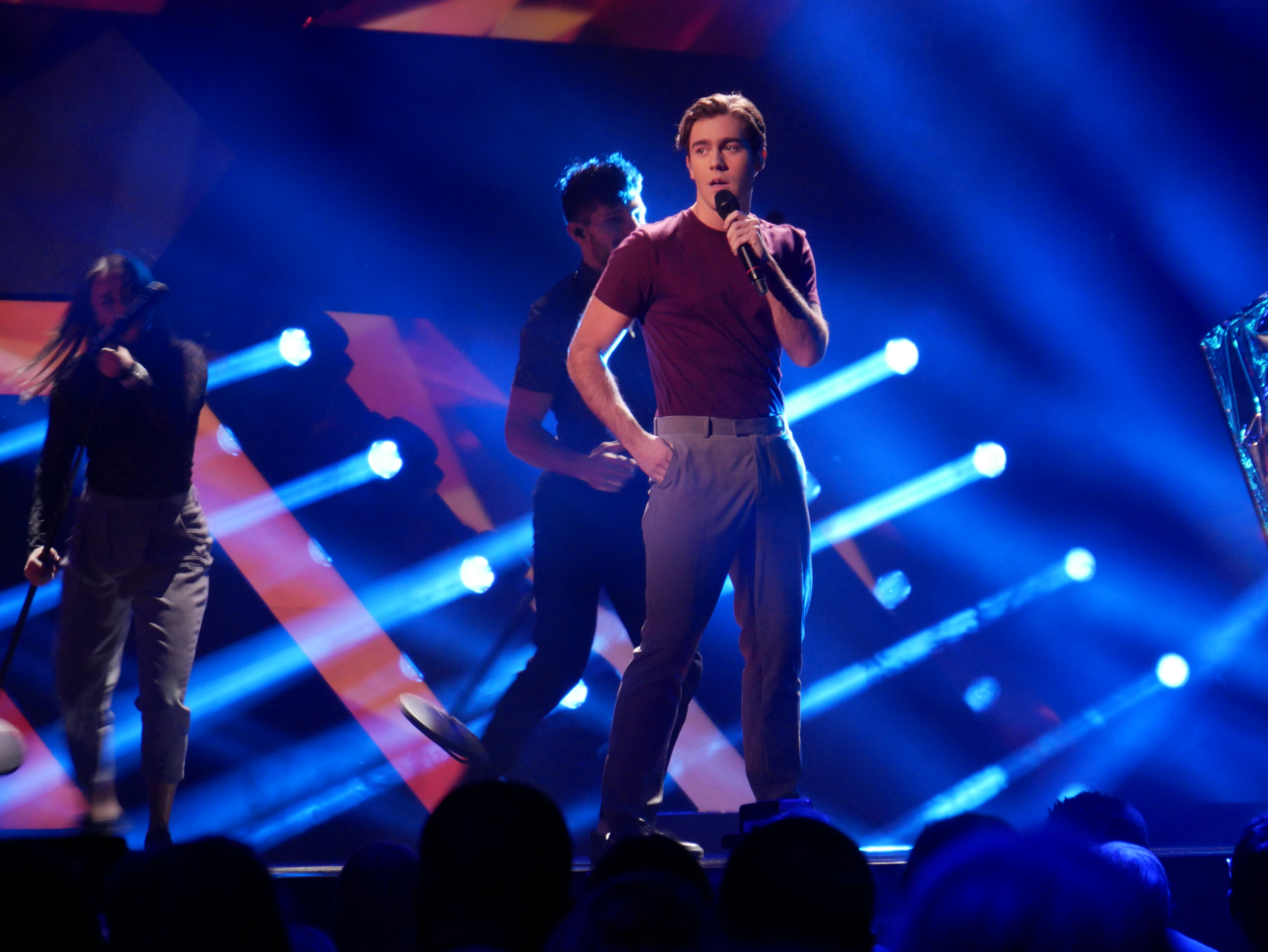 Melodifestivalen 2017, deltävling 2